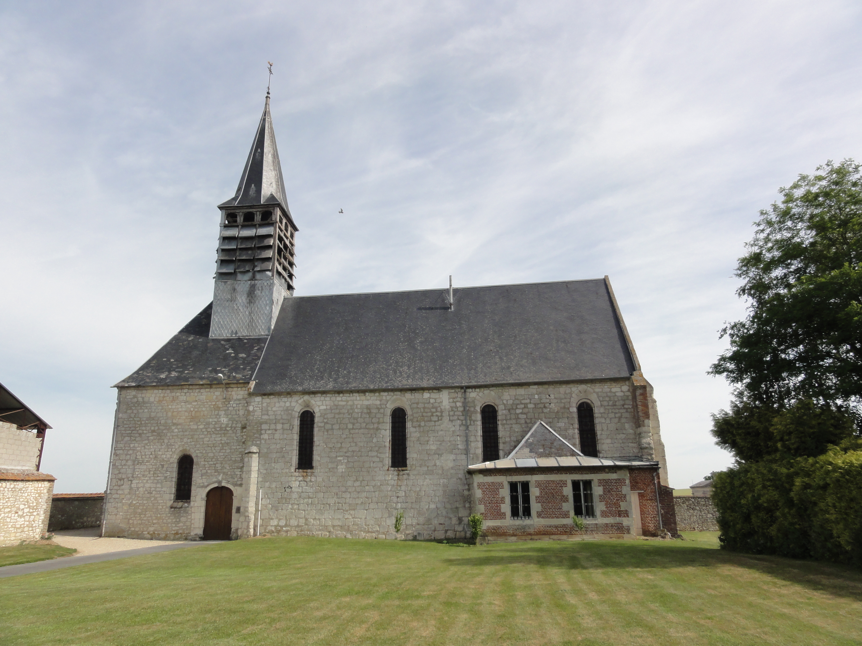 Boncourt (Aisne) église